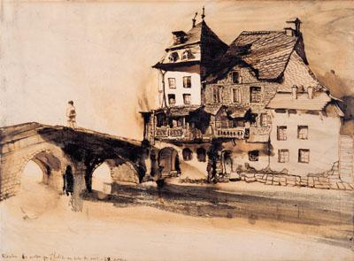 "La maison que j’habite au coin du pont", Zeechnung vum Victor Hugo.